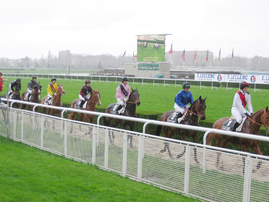 Course de chevaux du 28 mars 2005